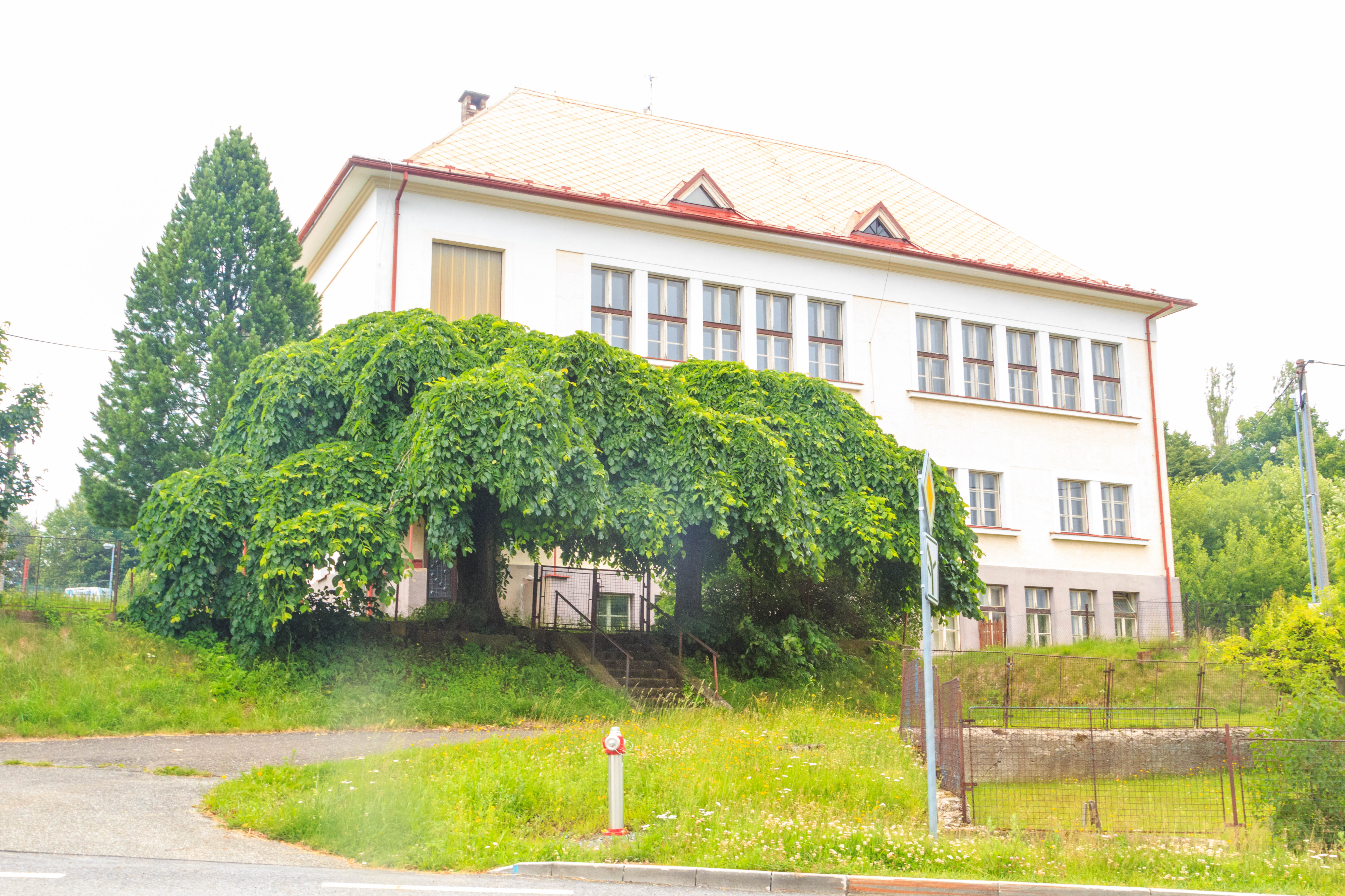 Borová u Nového Hrádku - škola